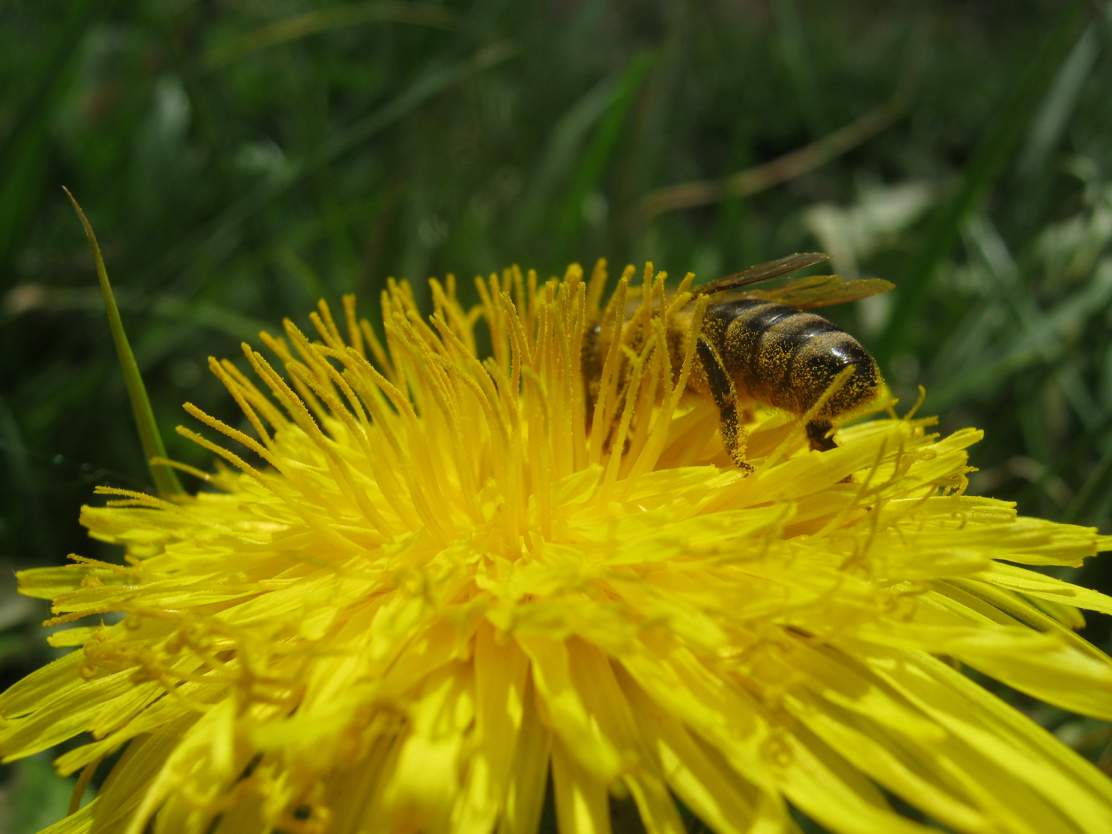 Пчела на маслачку, село Шарани.